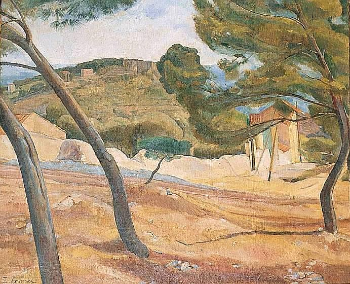 Paysage